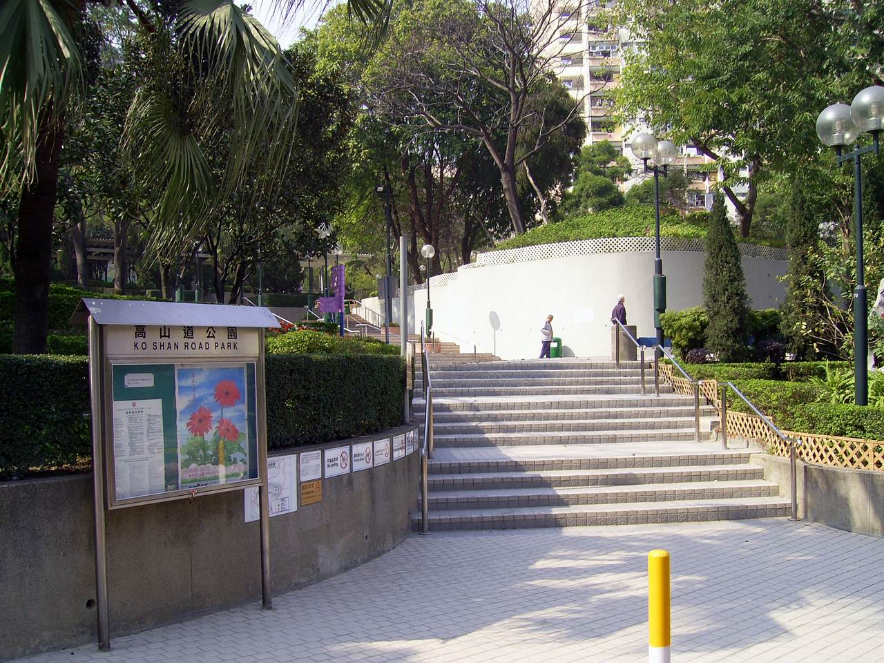 高山道公園